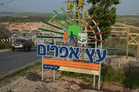 השלט המקדם את פני באי היישוב